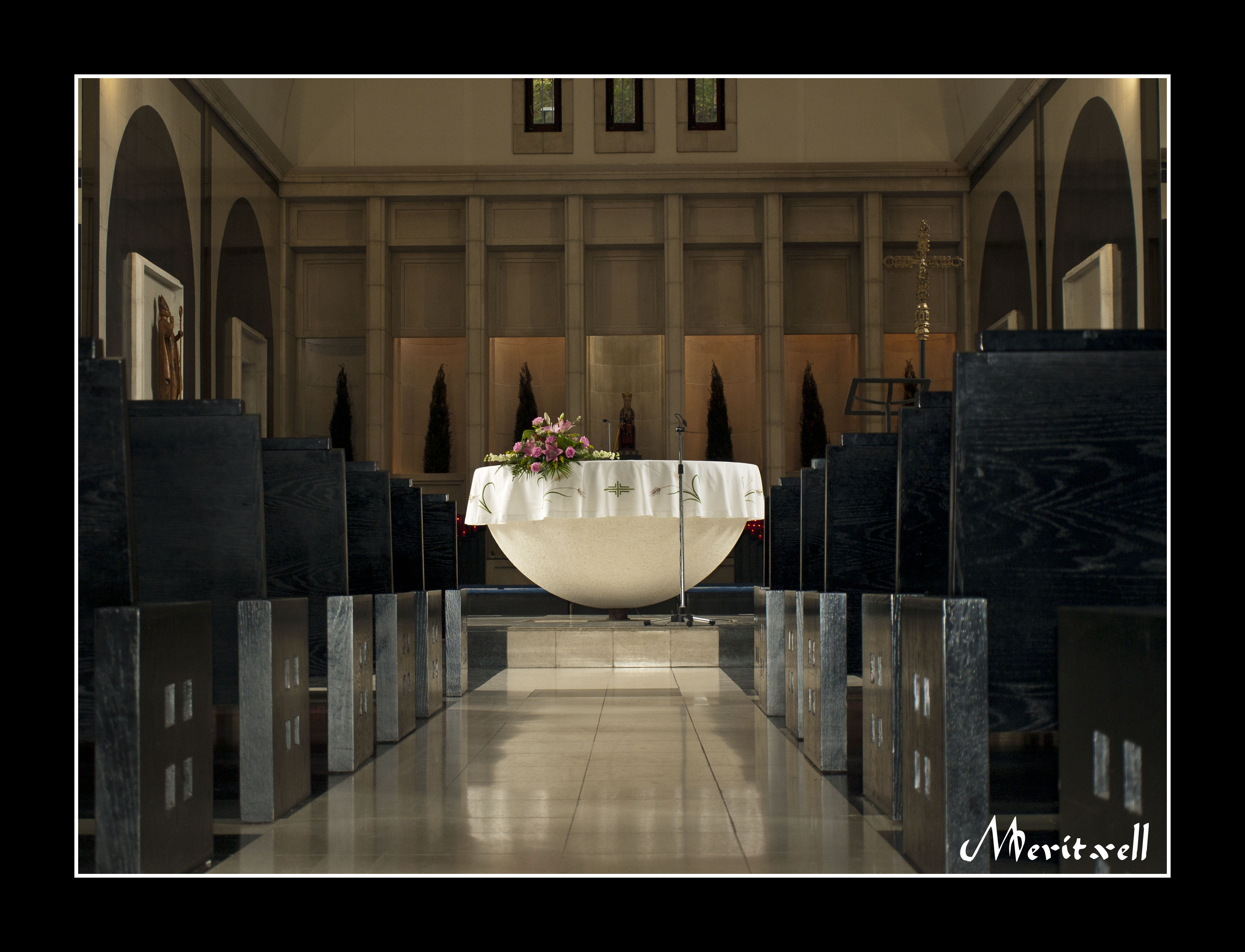 Santuari nou de Meritxell